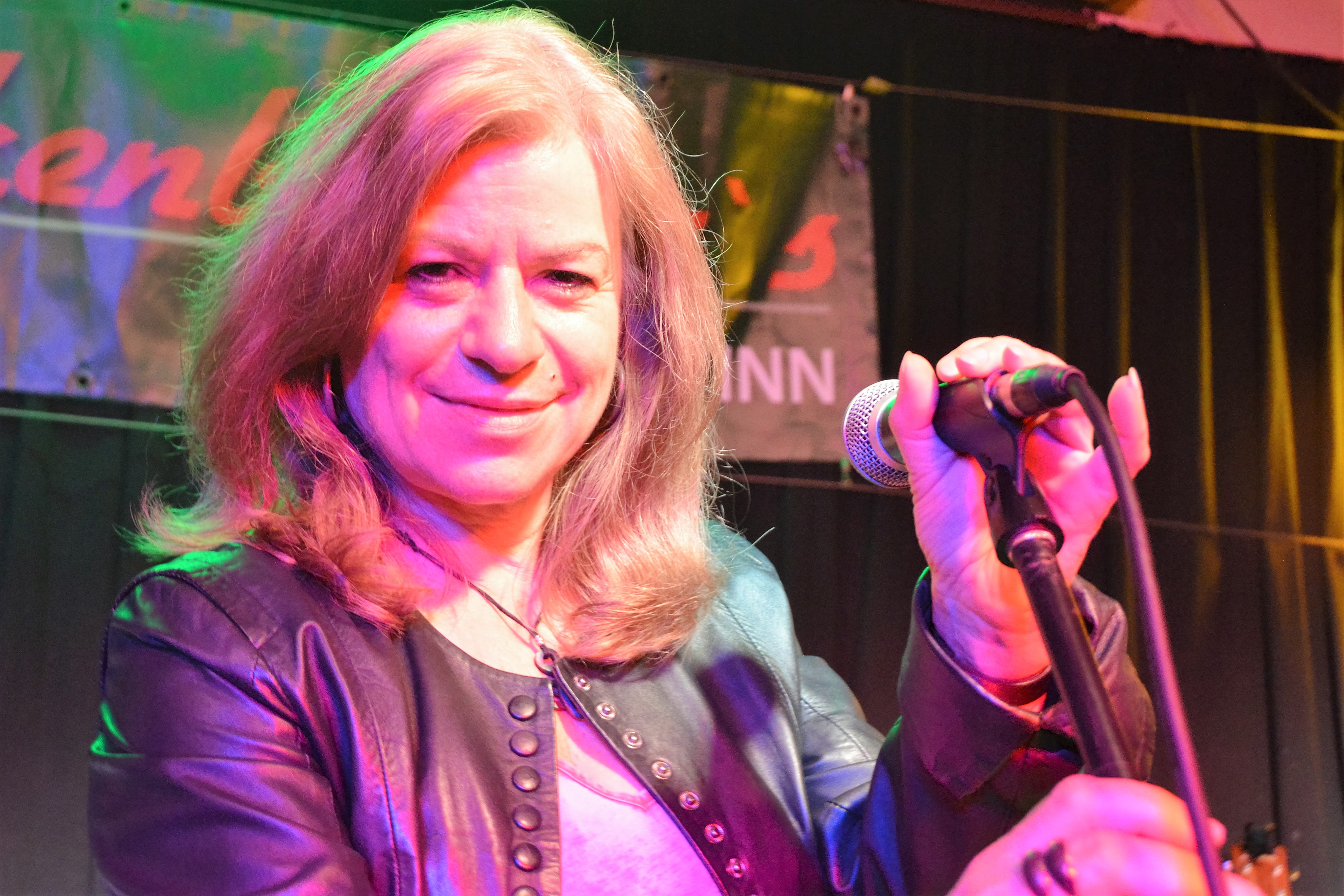 Silvia Christioph 2016